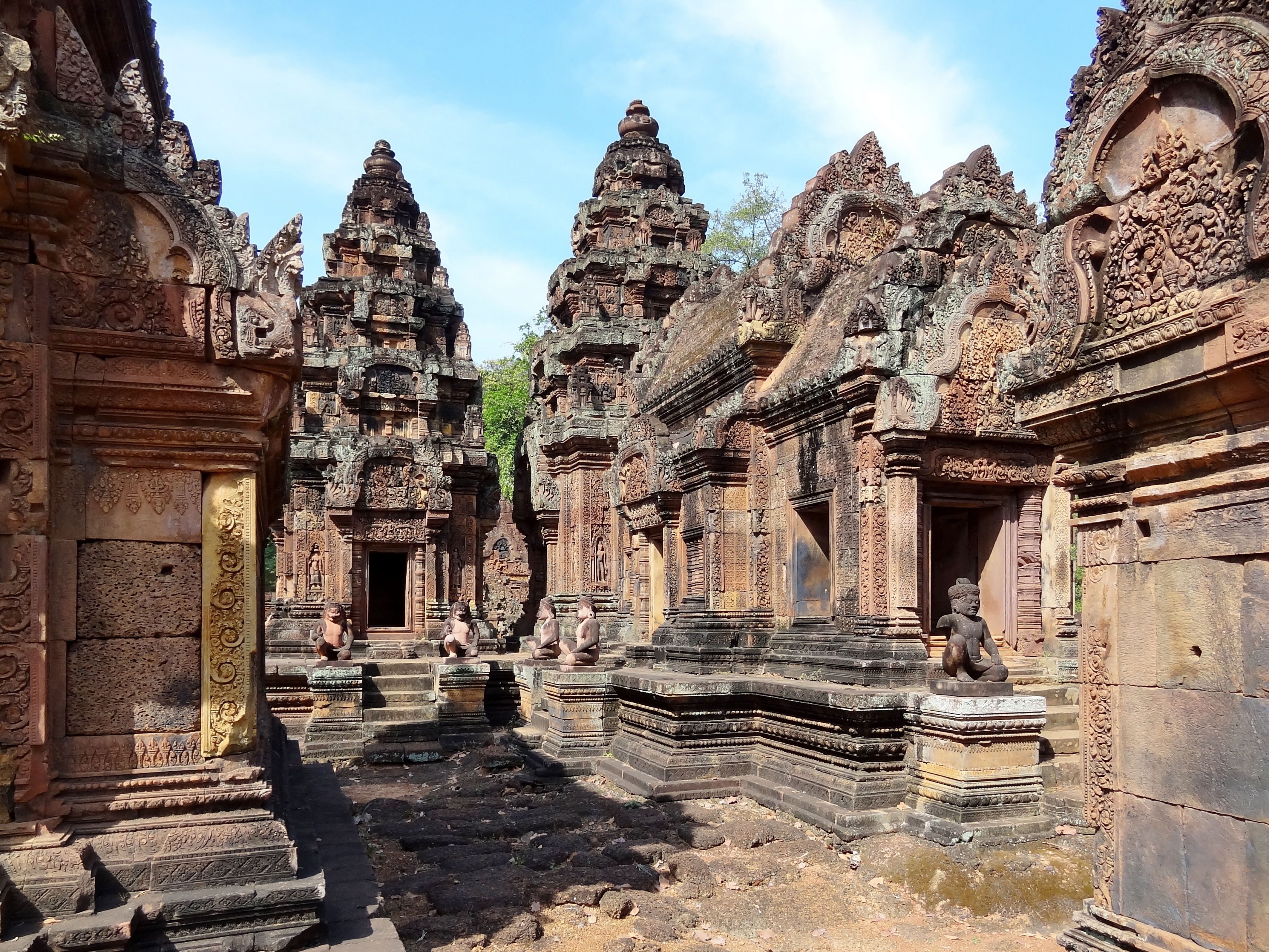 Zentraler und südlicher Prasat der Banteay Srei (ប្រាសាទបន្ទាយស្រី ‚Zitadelle der Frauen‘), ursprünglich Tribhuvanamahesvara (‚Großer Gott der dreifaltigen Welt‘), Provinz Siem Reap, Kambodscha